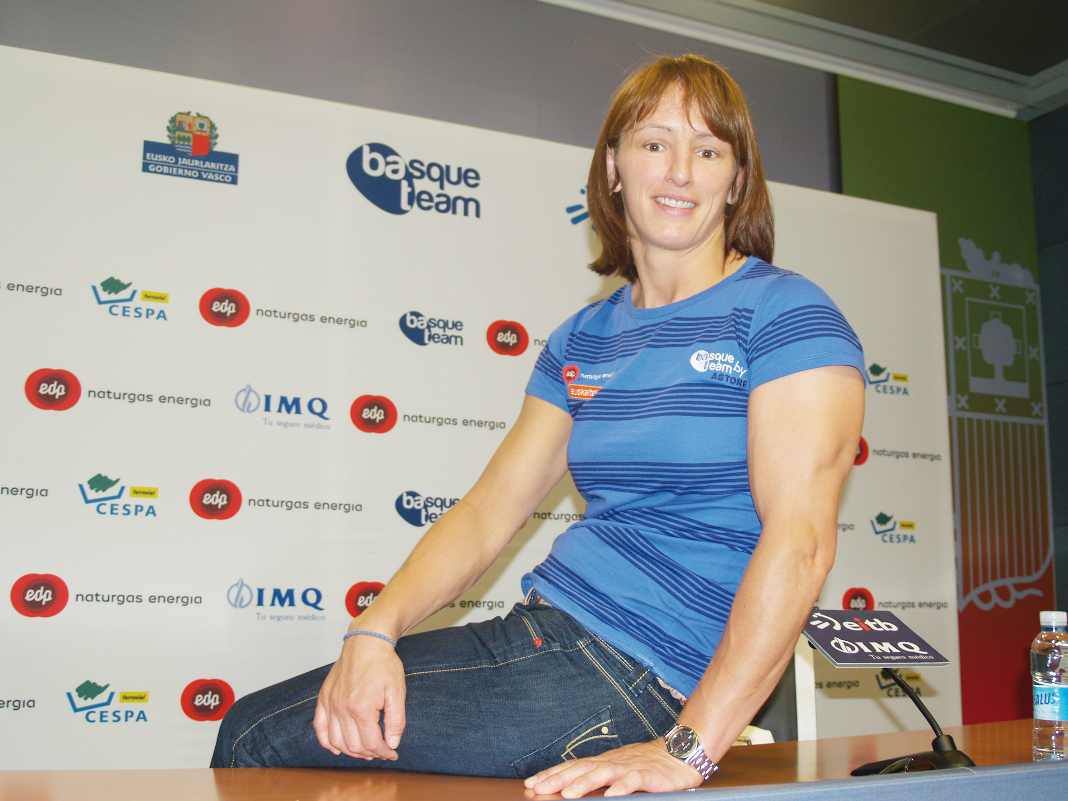 Maider Unda, Oletako (Araba) borrokalaria, 2016an.